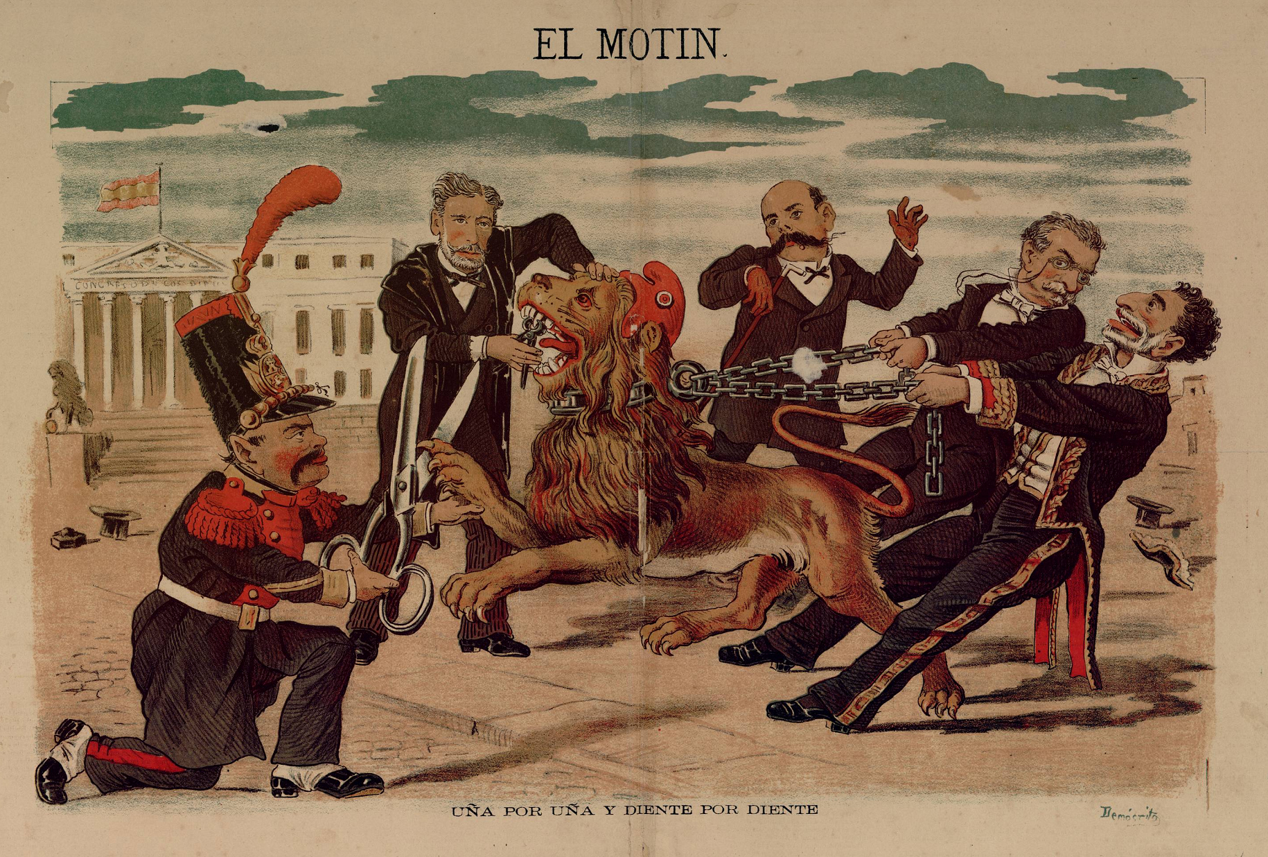 Uña por uña y diente por diente.